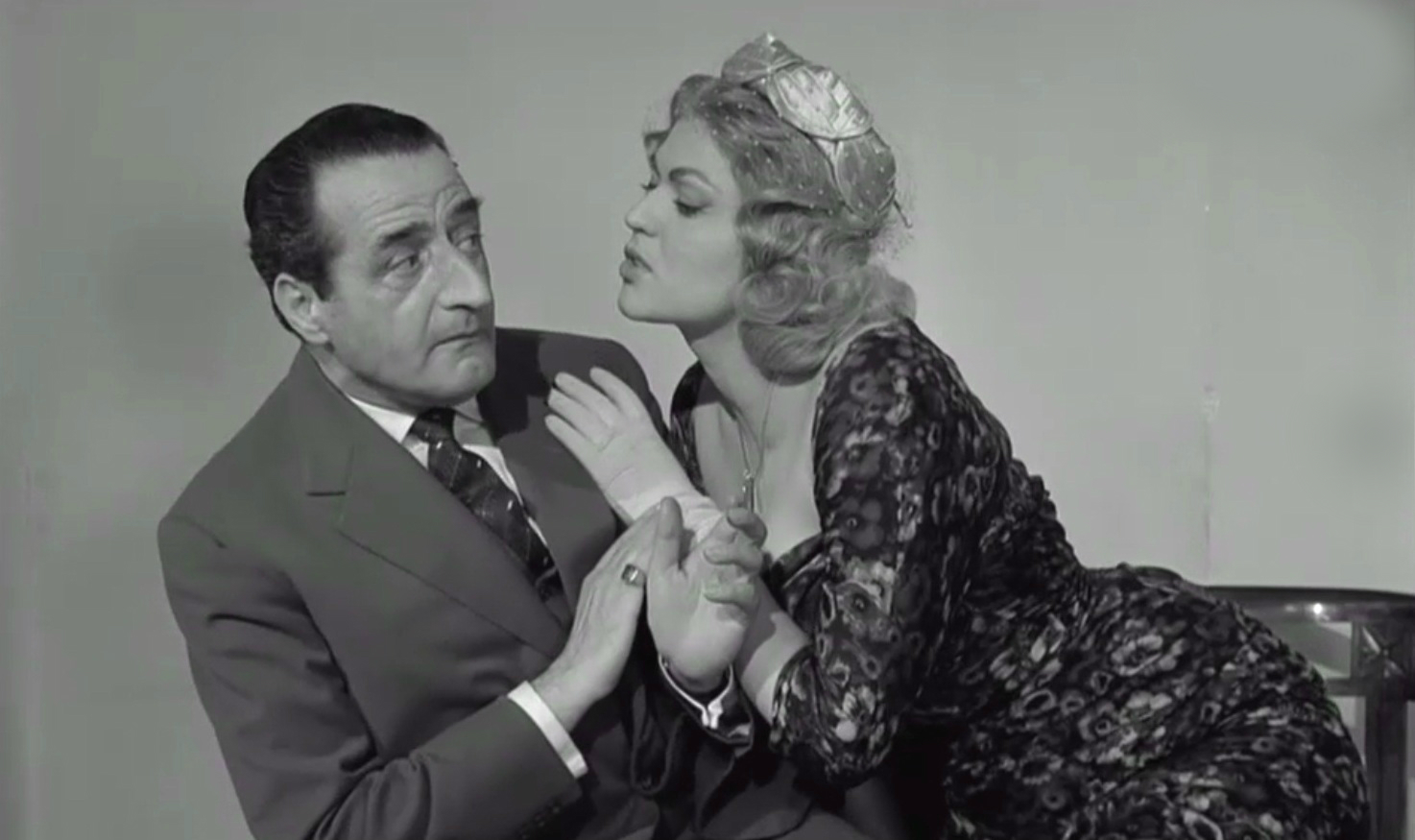 Screenshot del film I piaceri dello scapolo di Giulio Petroni (1960)